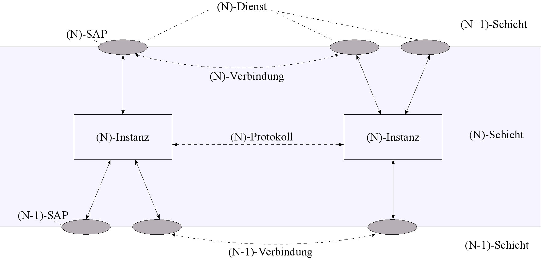 Einordnung des SAP in das OSI-Schichtenmodell